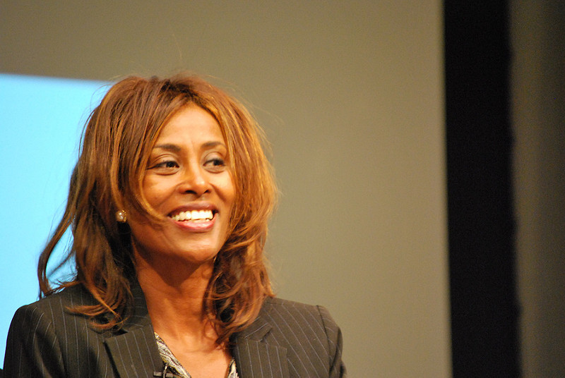 Photo